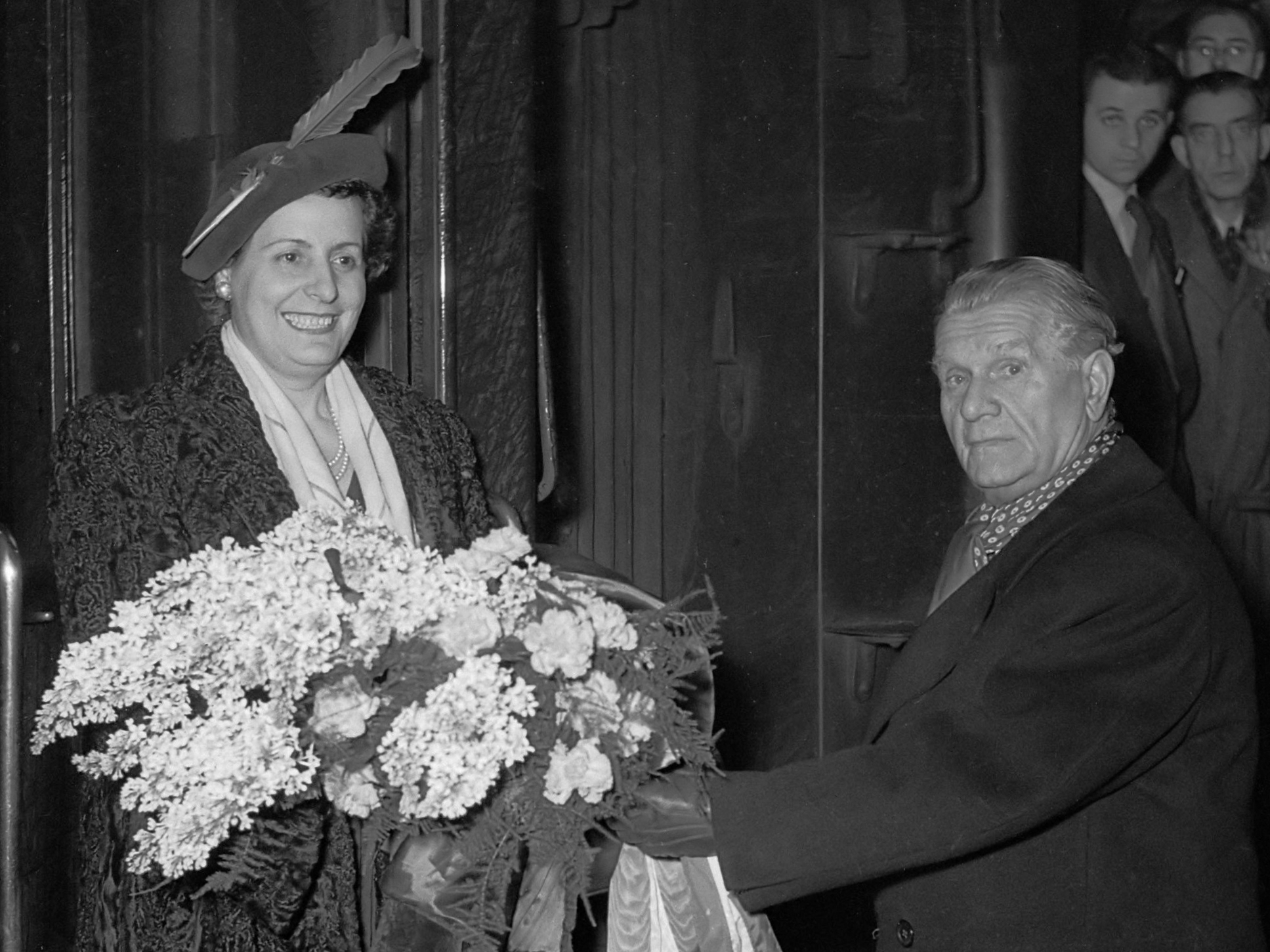 Sara Scuderi bezoekt Alex Wunnink 75 jaar 6 februari 1952